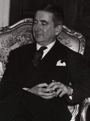 Srpski (latinica): Inventarski broj:1950-51_008_072